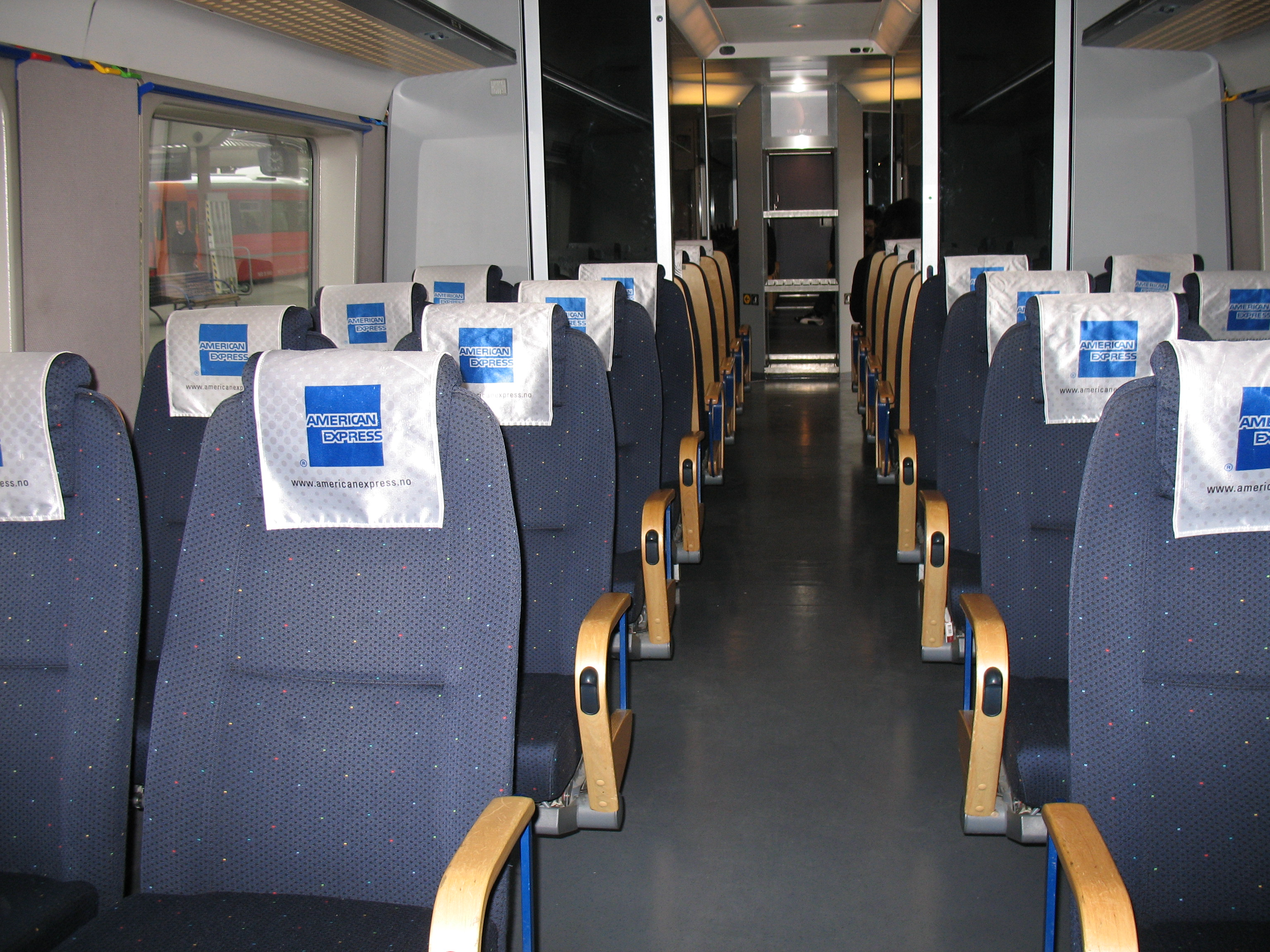 The interior of the airport express train. Oslo, Norway